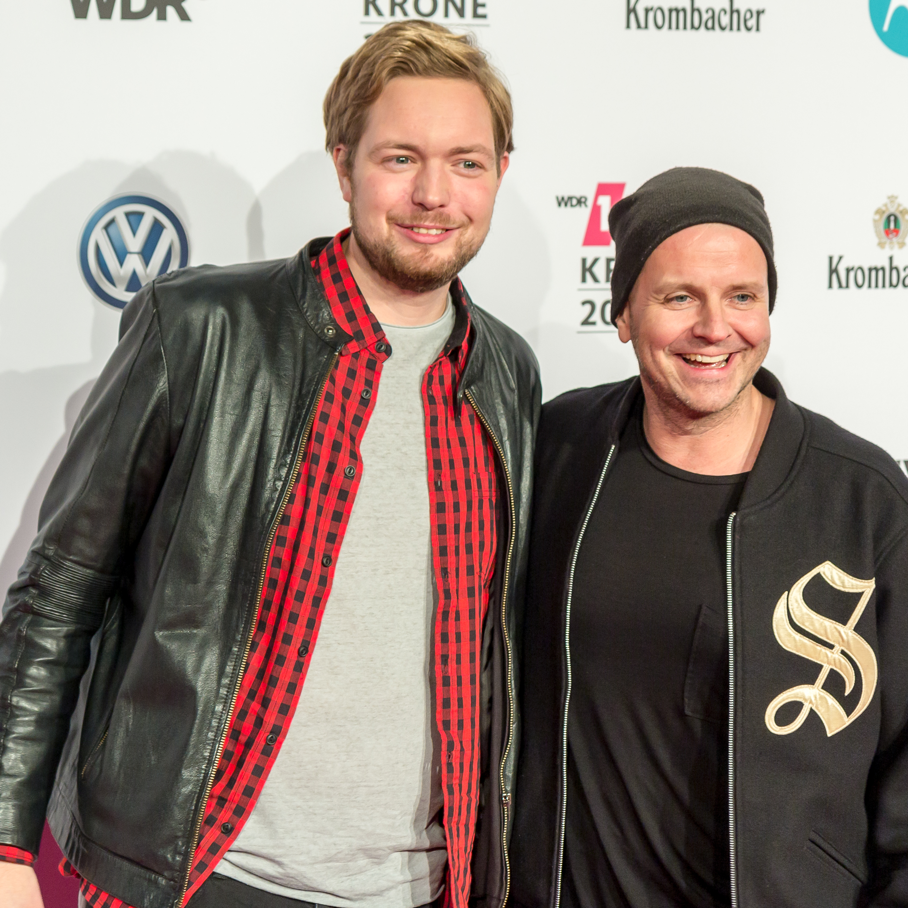 1LIVE Krone 2016 - 1700 - Roter Teppich - Bastian Bielendorfer und Moguai